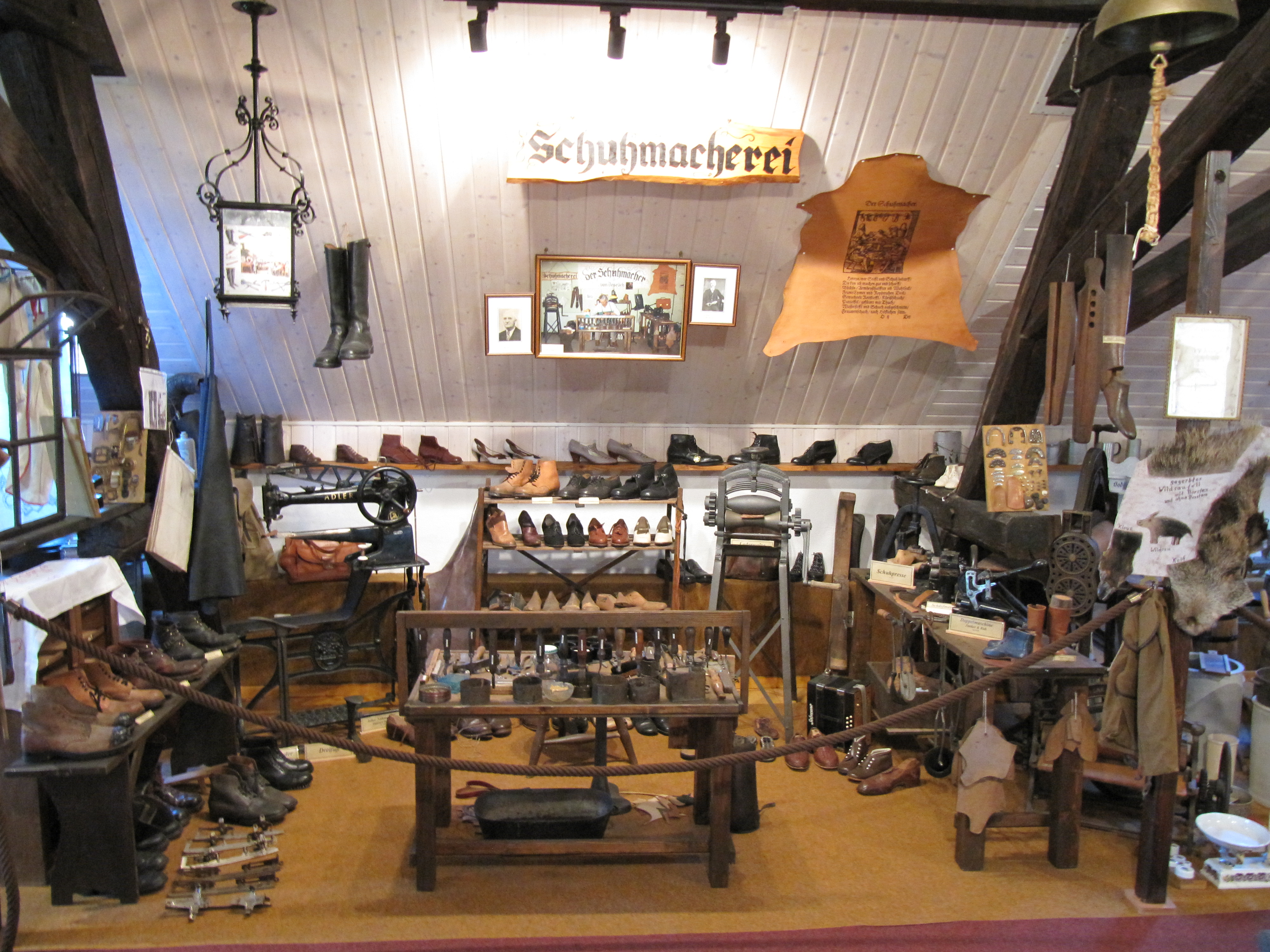 Obertiefenbach (Beselich) – Heimatmuseum – Einblick in den Museumsbereich Schuhmacherwerkstatt